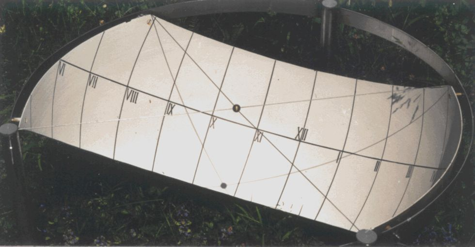 Hohlkugel-Sonnenuhr mit kleiner Kugel als Schattenwerfer (Nodus), skaliert für äquinoktiale Stunden Die Tragseile der schatten-werfenden Kugel zeigen in Sonnenauf- und in -untergangs-Richtung zur Zeit der Sonnenwenden.